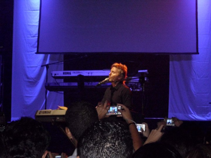 Fotografía de Laura Lückert tomada en el concierto del artista Noel Schajris en Maracaibo el 13 de abril de 2010.